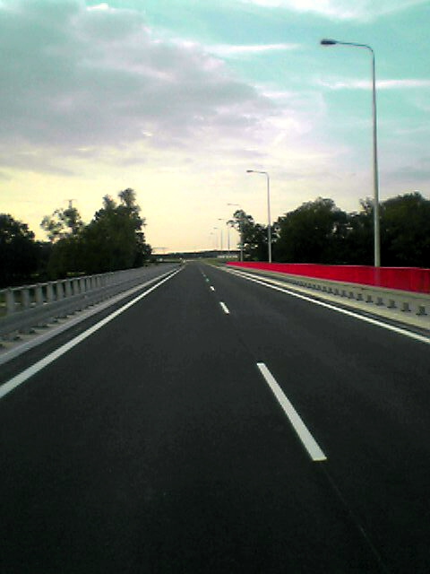 Śrem - DW432 i DW243 - Obwodnica miasta - Most nad Kanałem Ulgi.